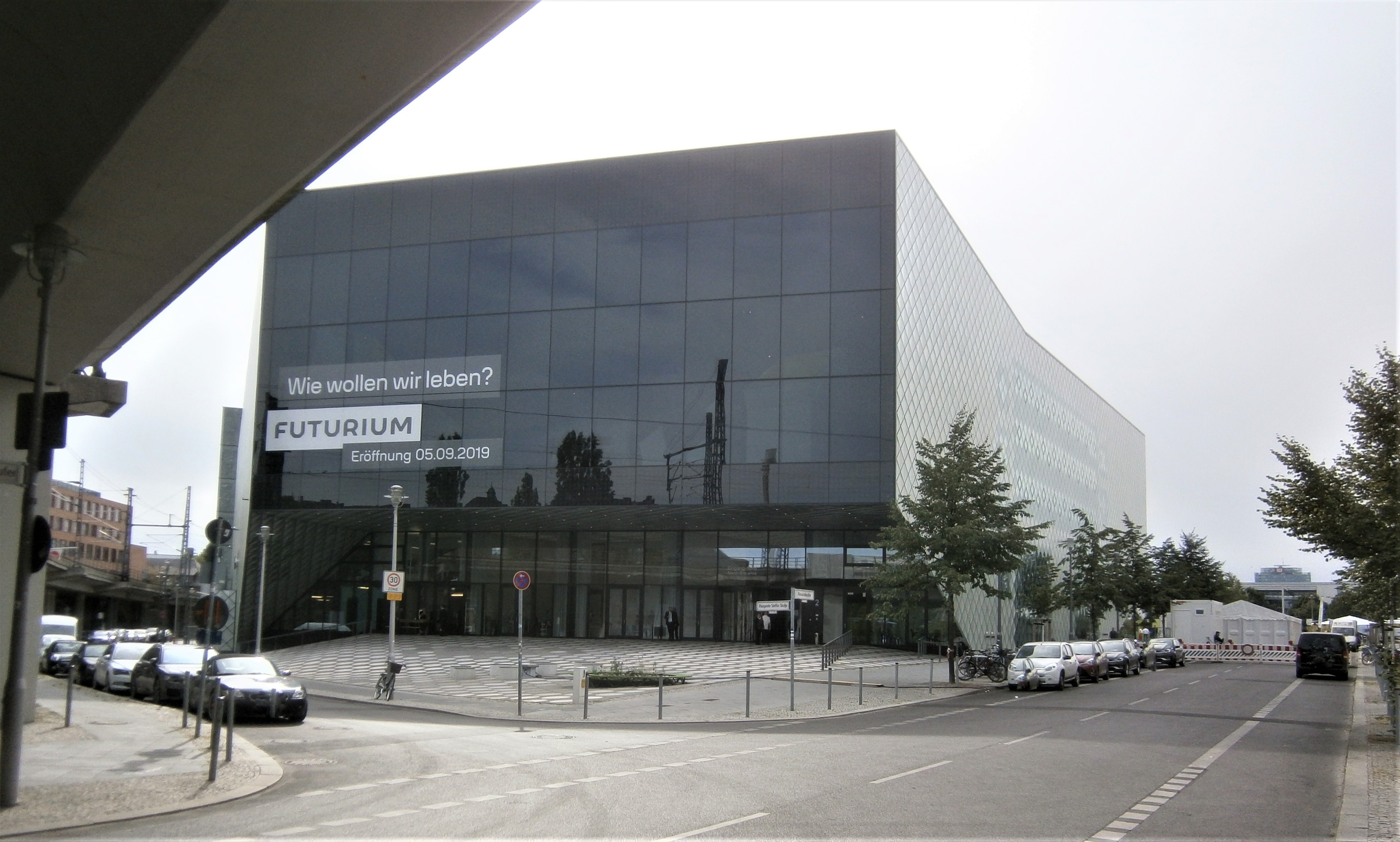 Der Nordeingang des Gebäudes "Futurium" vom Standort unter dem Viadukt der Stadtbahn östlich zum Hauptbahnhof. Aufnahme am Tag des Eröffnungsfestes. Zum Eingang mit dem vom Dach überkragten Vorplatz und dessen Punktmuster.